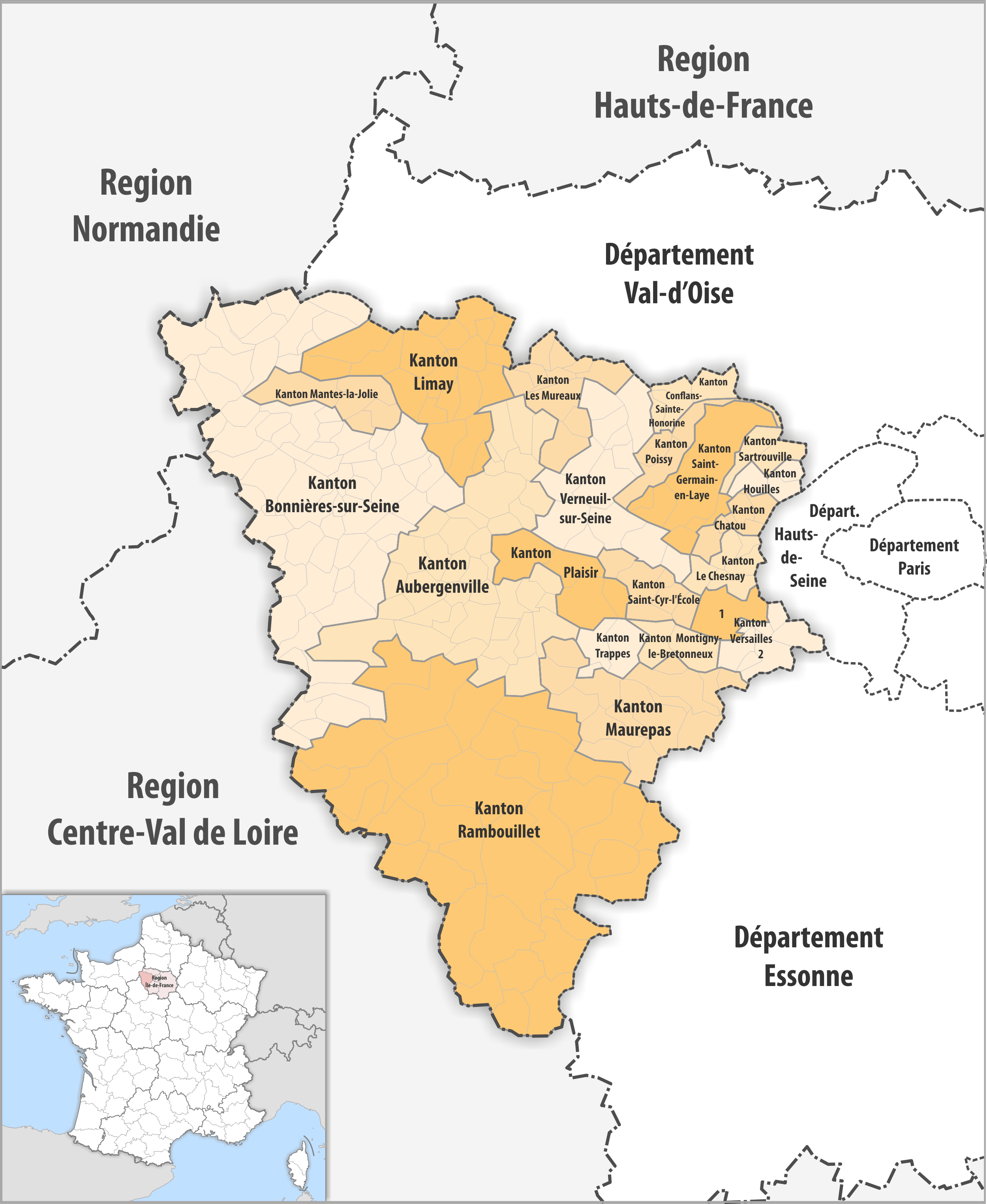 Gemeinden und Kantone im Departement Yvelines